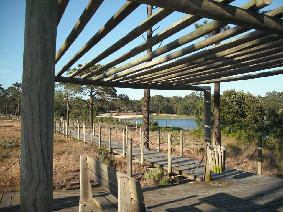 É ainda um local privilegiado de refúgio e nidificação de avifauna. Nas dunas envolventes existem passadiços de acesso, vários pontões de pesca, instalações de apoio, parque de merendas e parques de estacionamento automóvel.